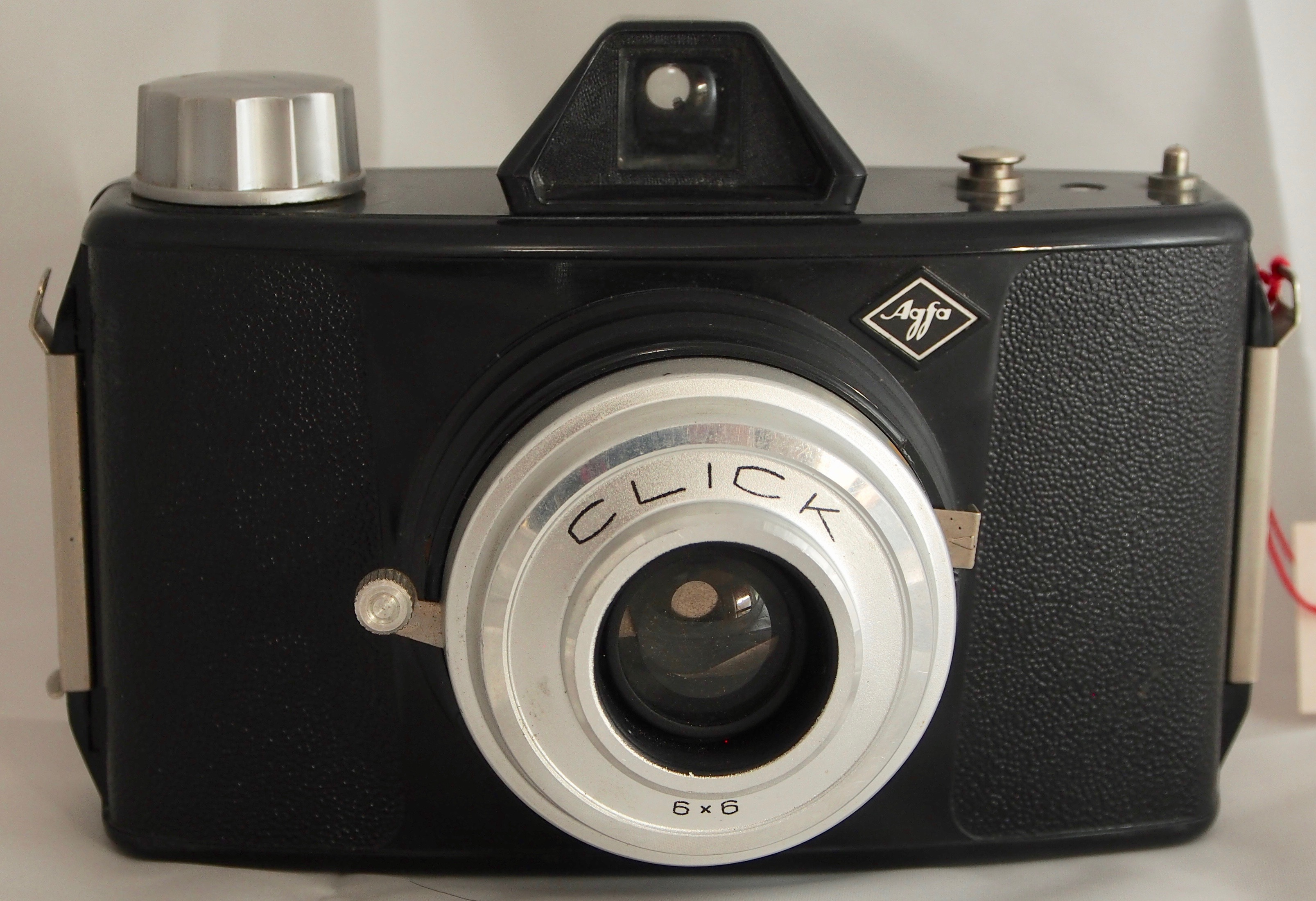 Click I Kadl# 1291 Made in France